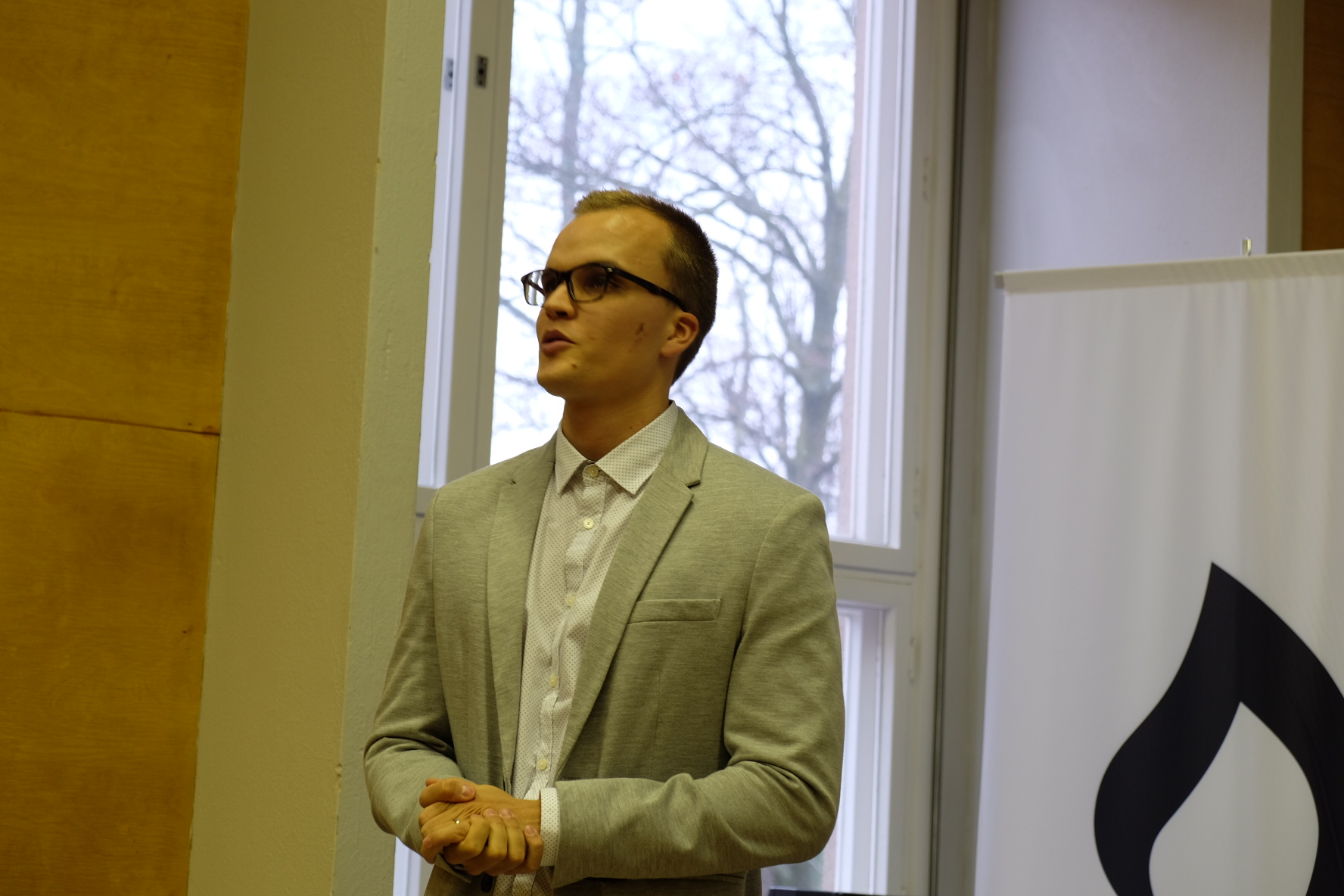 Kristillisdemokraattisten nuorten puheenjohtaja (vuodesta 2015 alkaen)